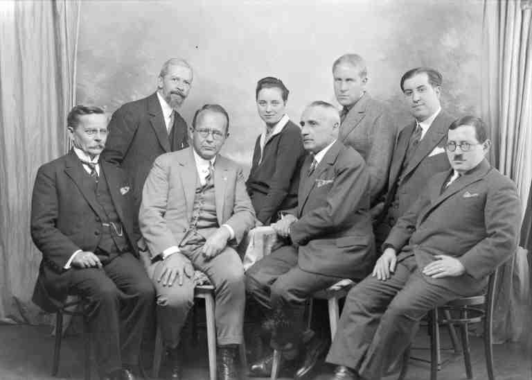 Redaktion Berner Tagblatt: Gruppenfoto